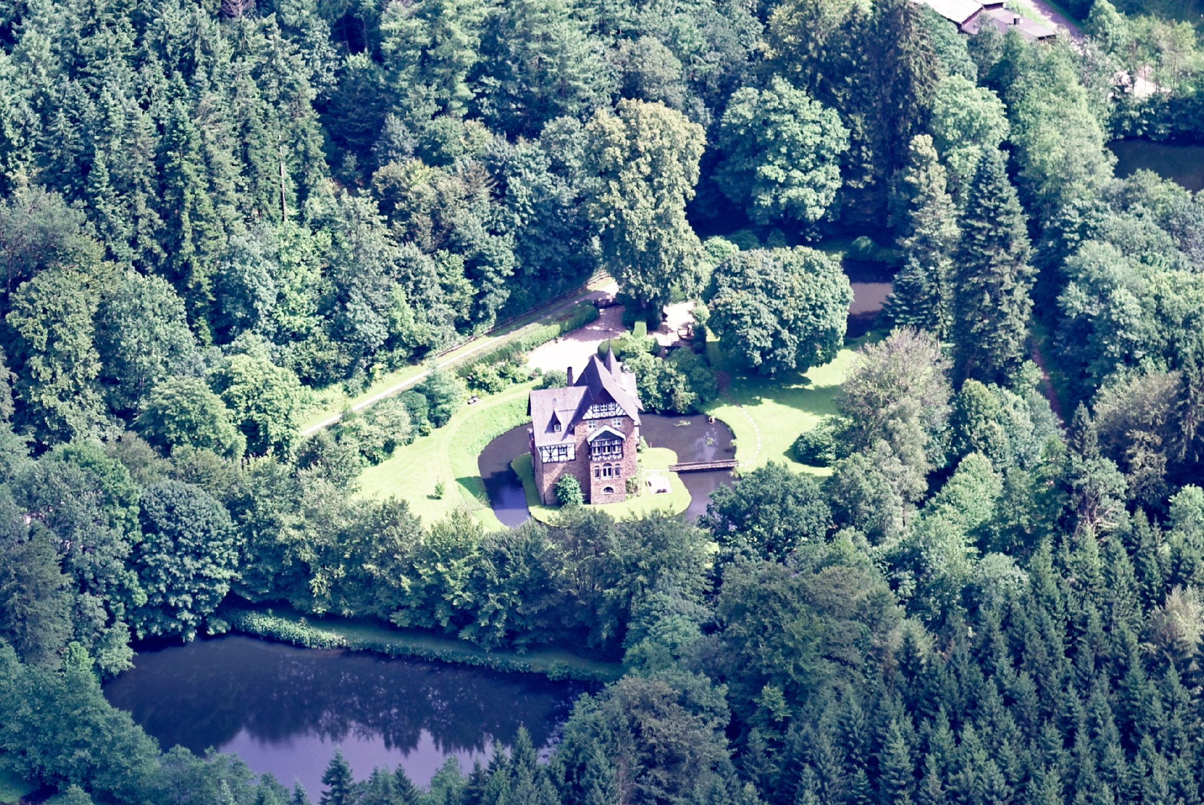 Luftaufnahme: Schloss Badinghagen in Meinerzhagen, Nordrhein-Westfalen